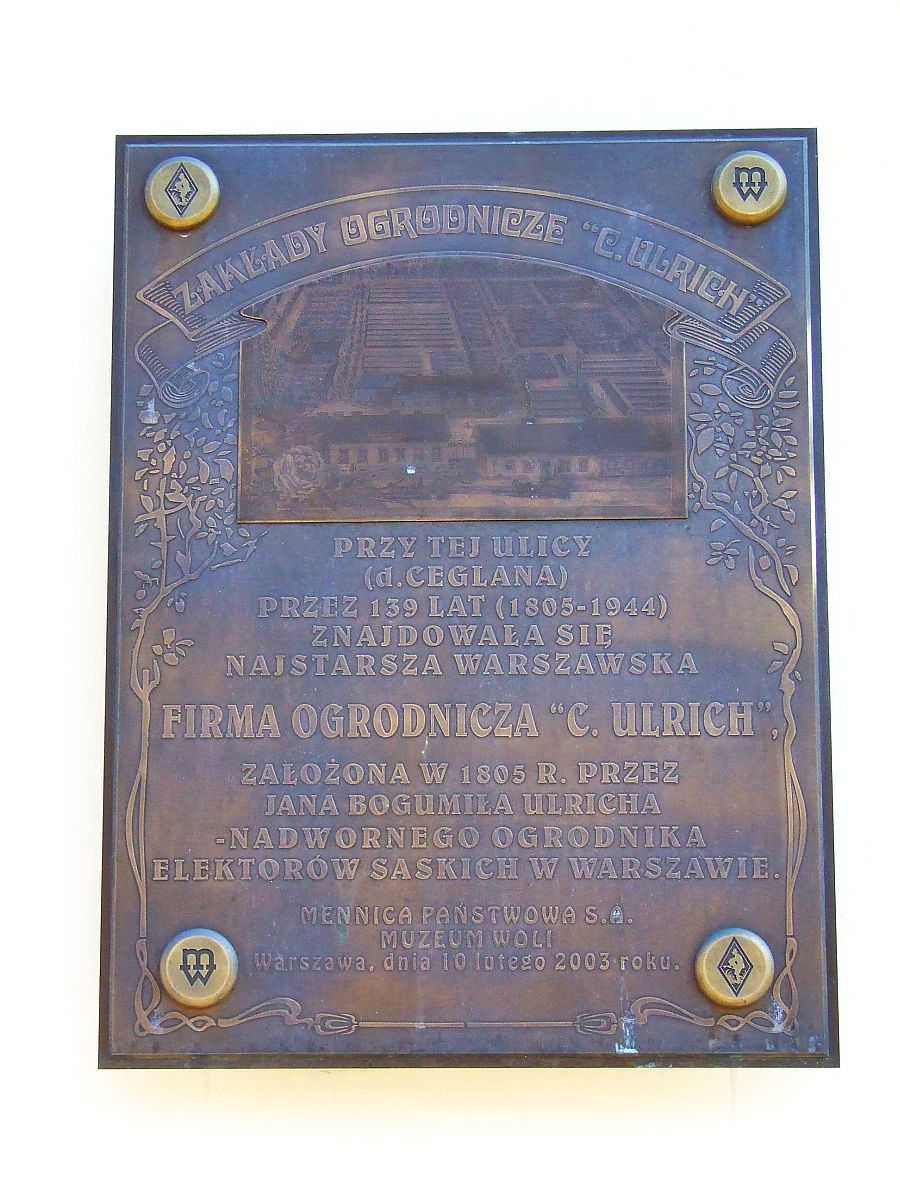 Ogrody Ulrychów, table on Ceglana Street